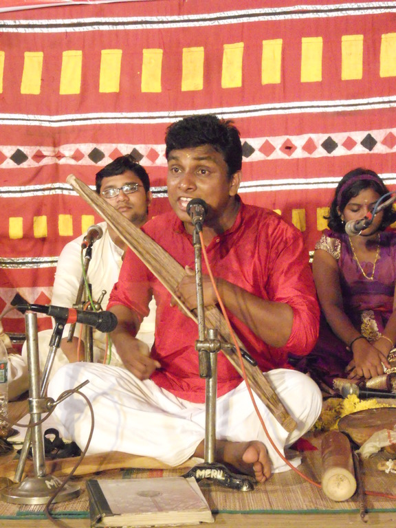 ഓണവില്ല് ഉപയോഗിച്ചുള്ള പാട്ട്